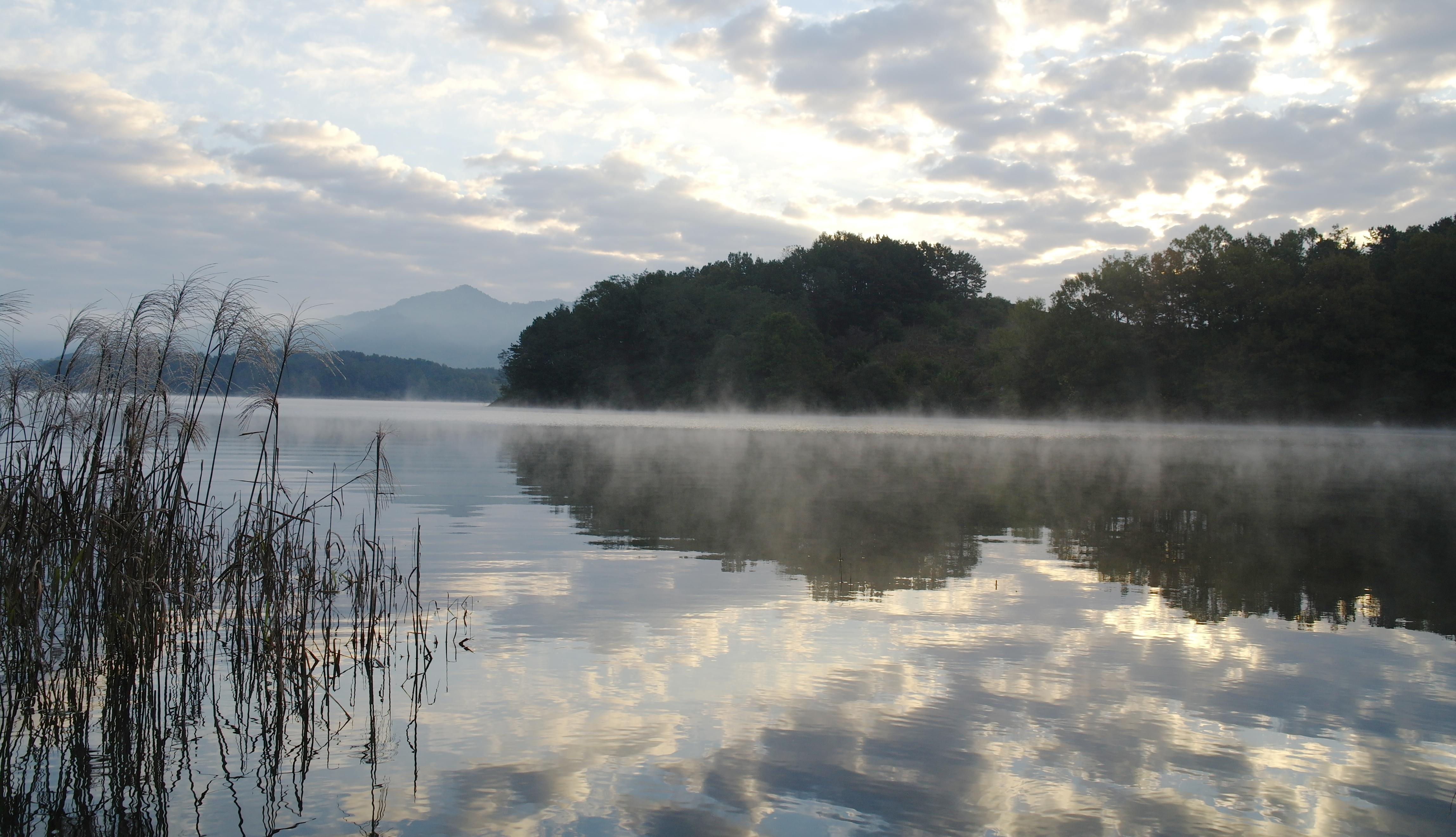 대청호오백리길 4구간